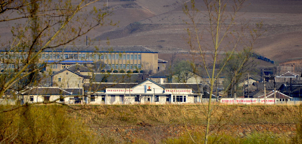 咸镜北道钟城站